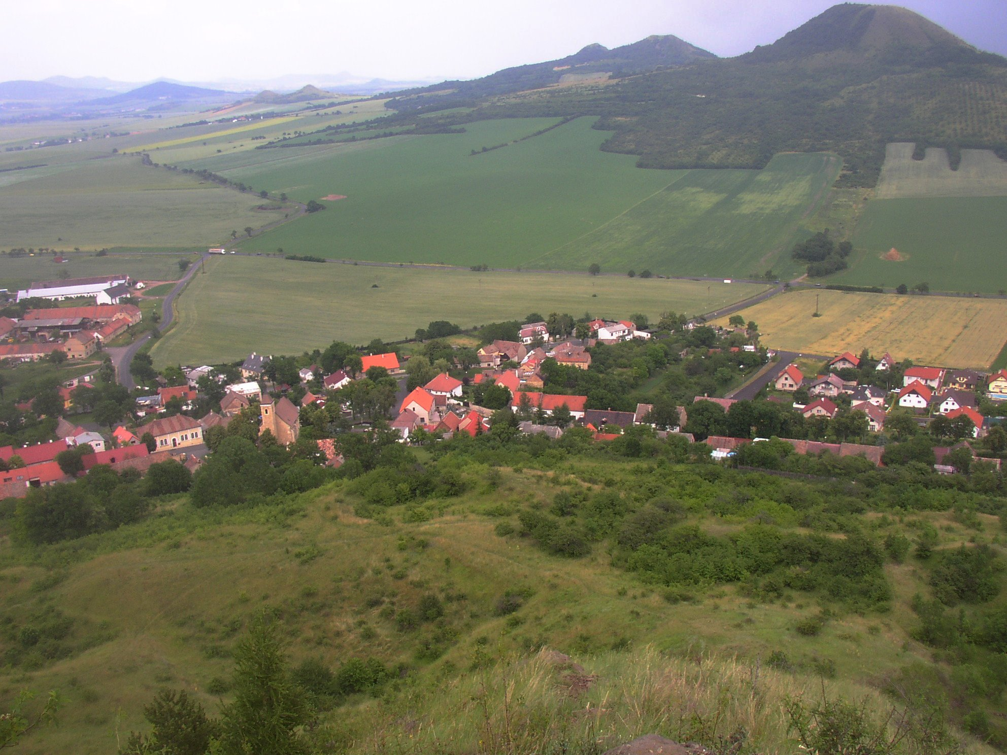 České středohoří. Pohled na ves Raná z východního konce stejnojmenného vrchu. V pozadí zprava trojvrší Oblík, Srdov a Brník.